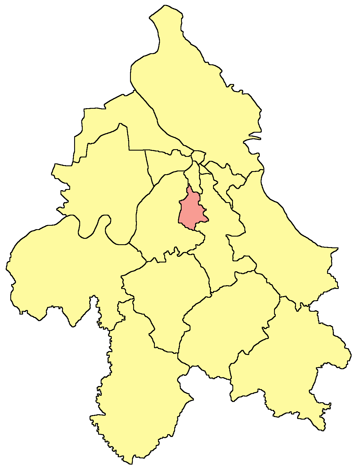 Belgrade municipality map